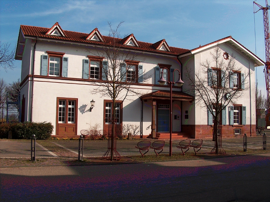 Alter Bahnhof (Neulußheim)